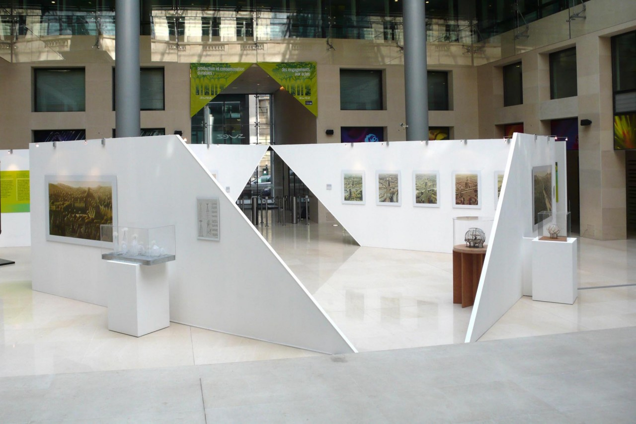 Photo exposition Paris